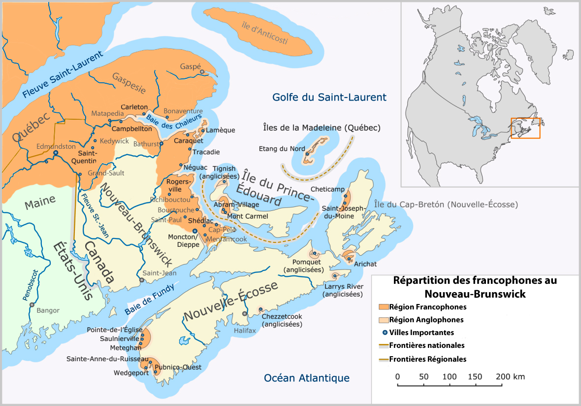 Répartition des francophones dans le Nouveau-Brunswick Français cadien: Répartition des francophones dans le Nouveau-Brunswick